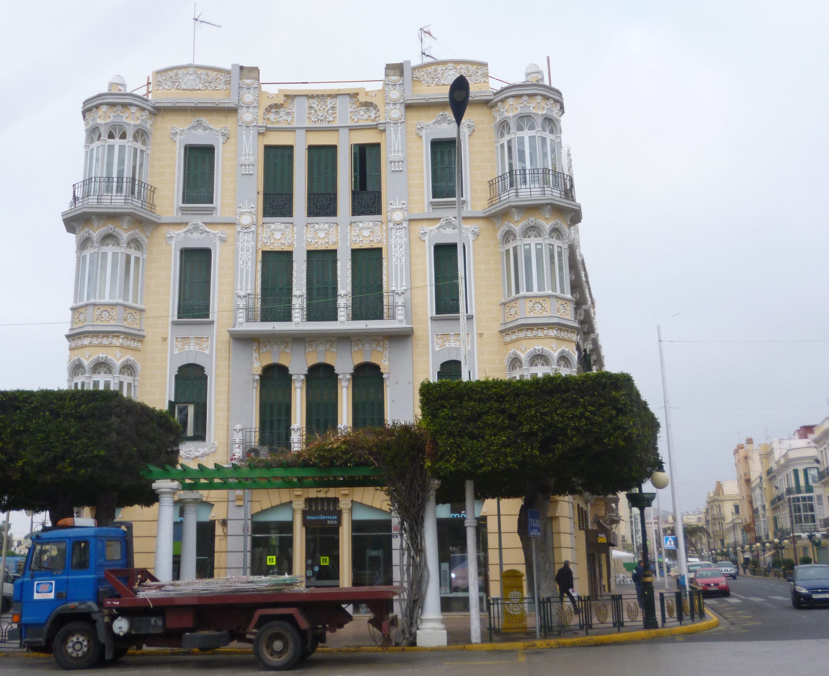 Melul